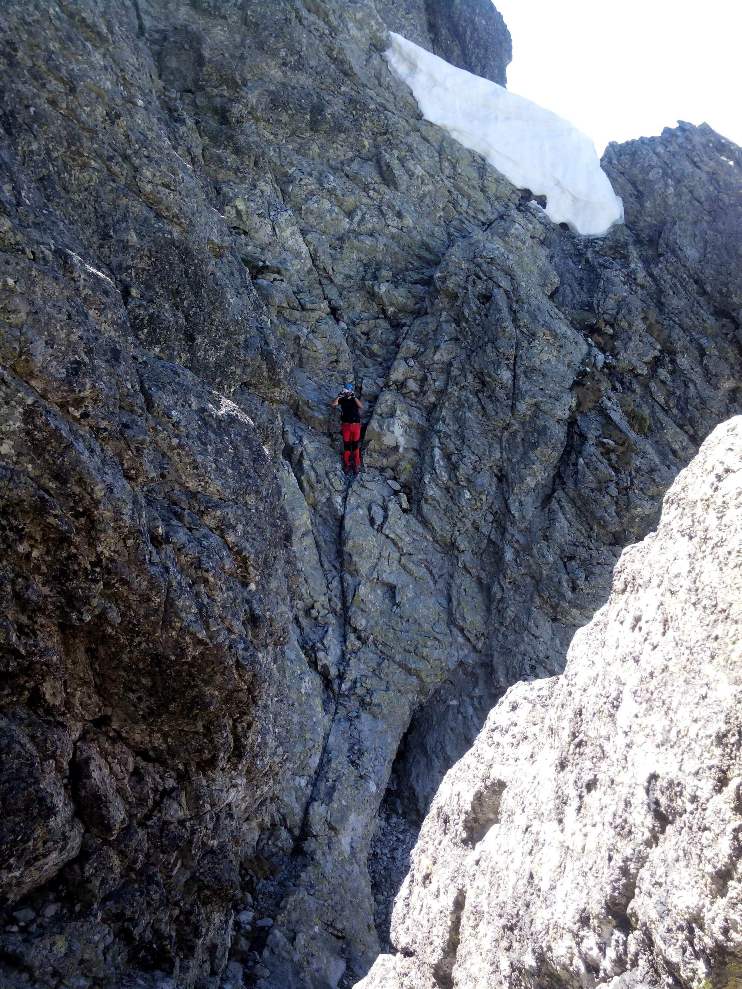 Wejście na Staroleśny Szczyt